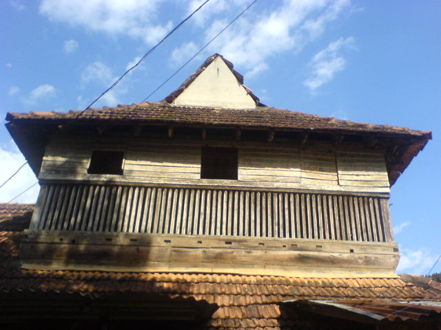 പന്തളം കൊട്ടാരം